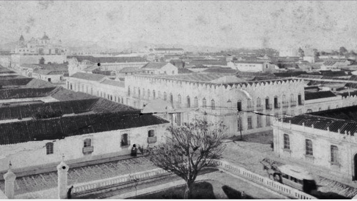 Vista del edificio Recinos desde el Teatro Colon. Fotografia tomada aproximadamente en 1900